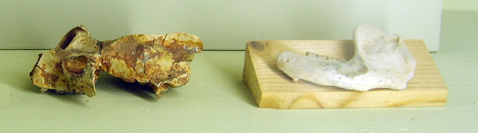 Adapis parisiensis skull and lower jaw at the Museum für Naturkunde, Berlin.